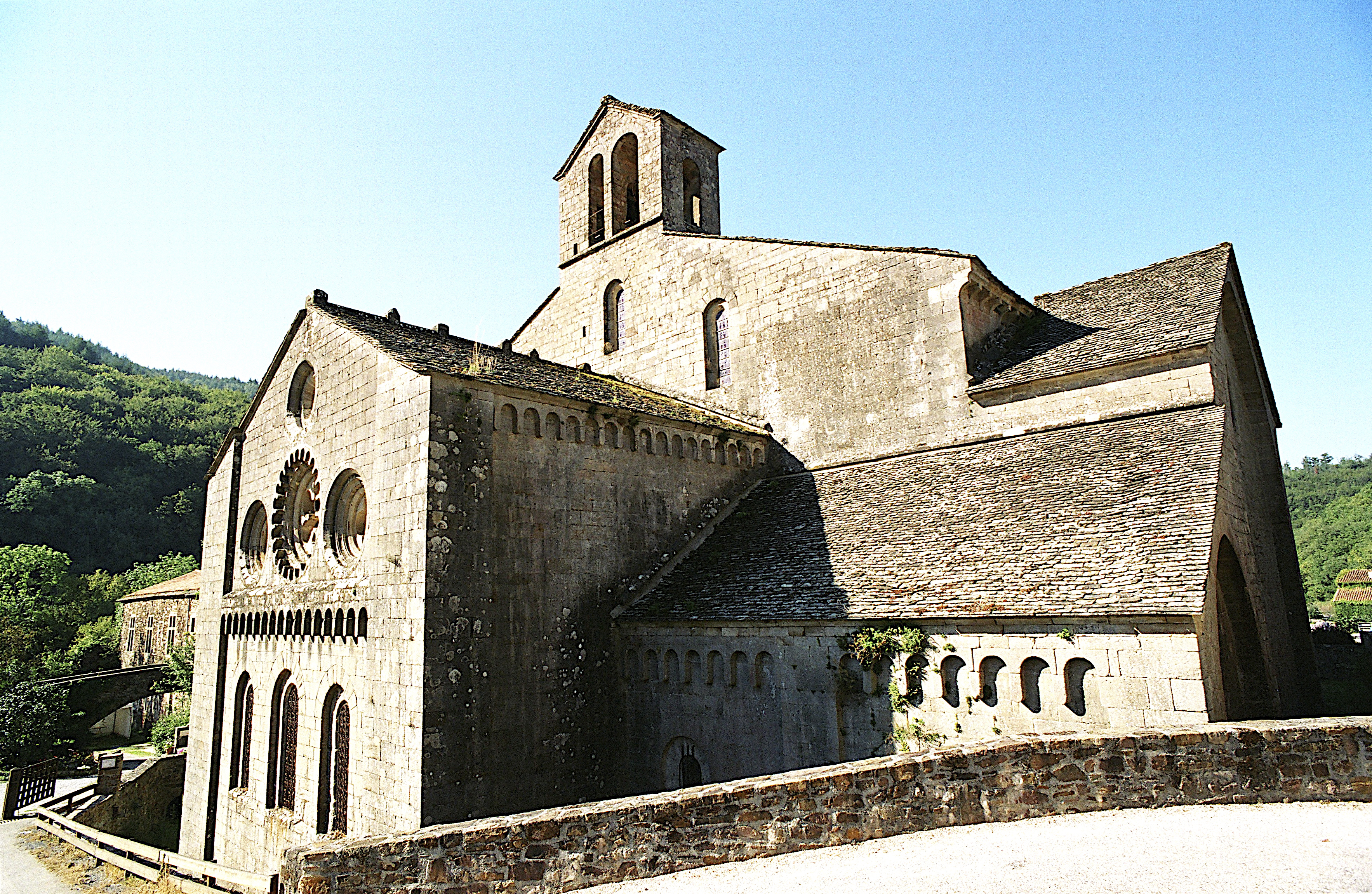 Abbaye de Sylvanès (Aveyron) - église abbatiale. Le chevet est percé d'un triplet de fenêtres surmonté d'une rose à 6 lobes entourée par deux ouvertures quadrilobées, le tout surplombé par un oculus